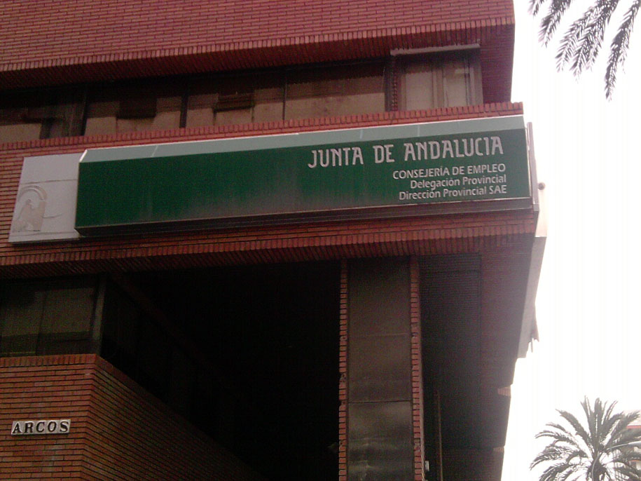 Edificio de la delegación provincial de la Consejería de Empleo en Sevilla.